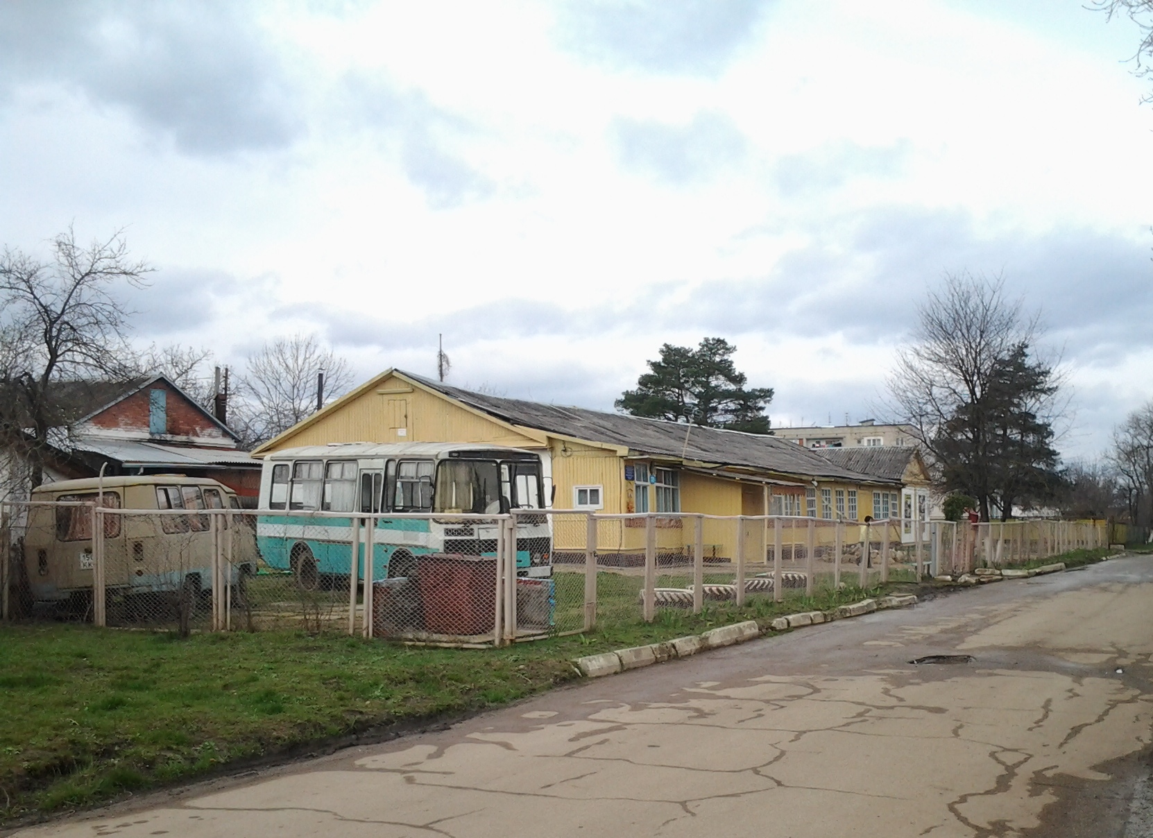 Клуб юных техников